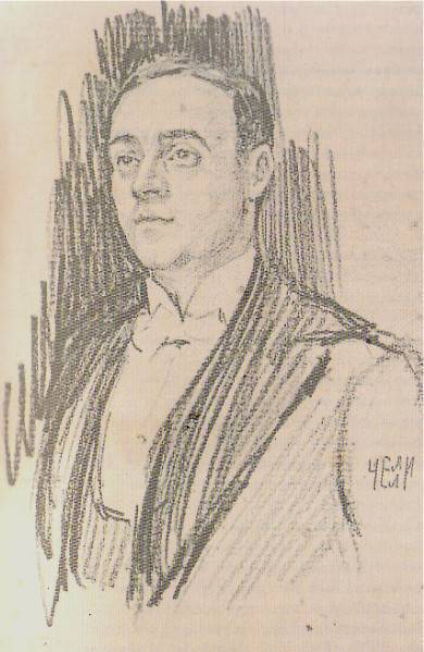 А. М. Карензин. Портрет работы художника Челли. Опера С. Зимина (Москва). Репродукция из книги "История оперы Зимина. 1903—1917 гг." М., 2005. С. 175